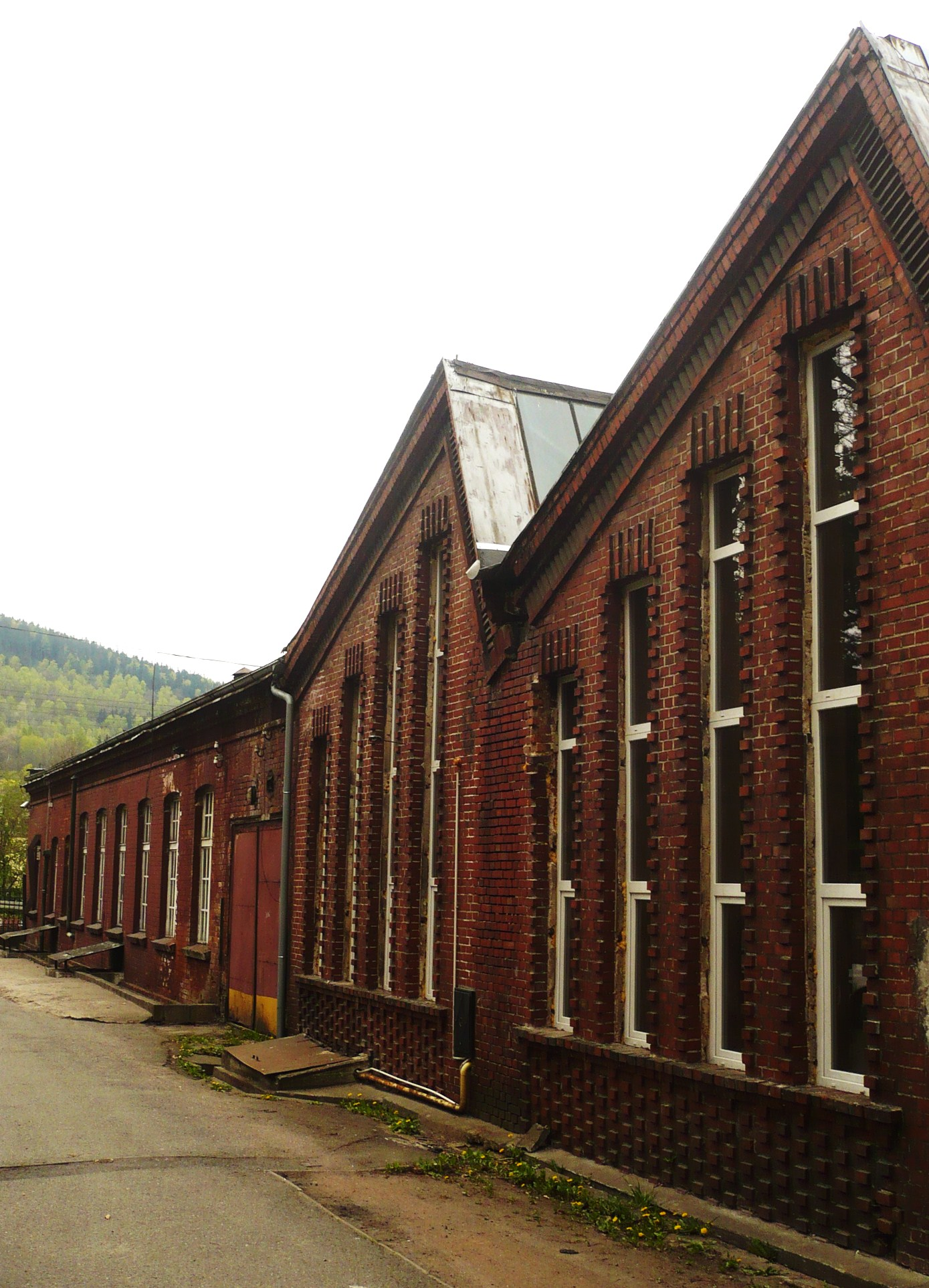 Drukarnia Klambta